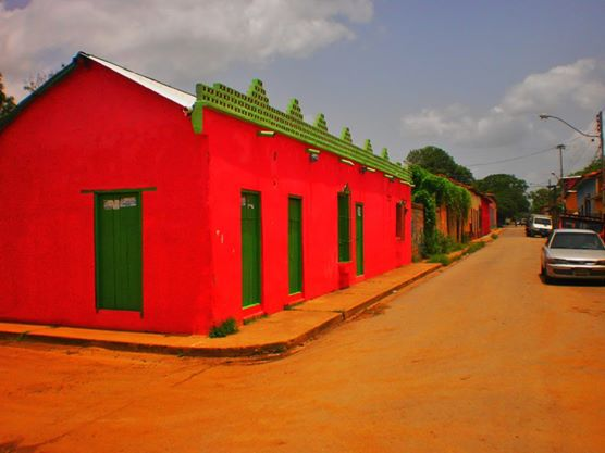 Calle Comercio de Guanape